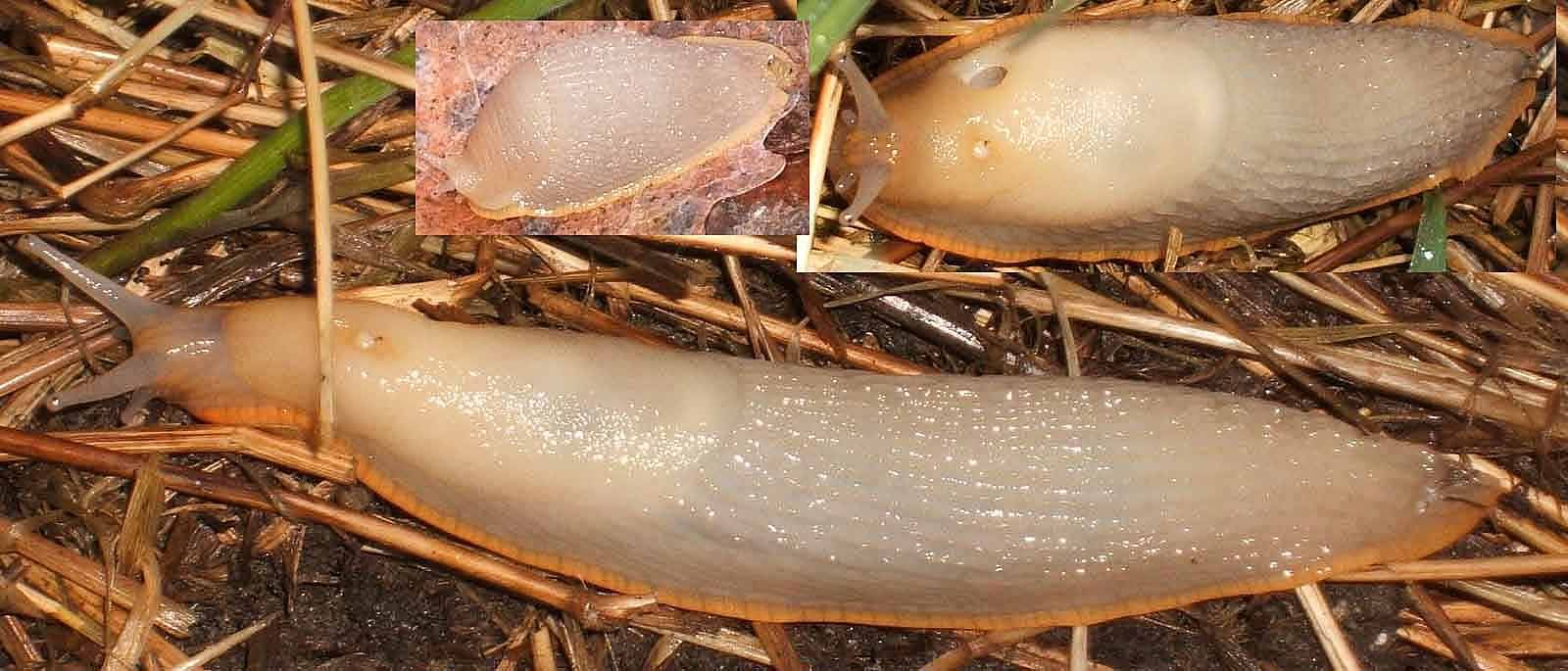 2 different Arion ater White , in 3 positions Norwegian:Bilde inneholder 2 eksemplar av den kvite varianten av Skogsneglen (Arion ater). Desse er vanligvis off-white til gulaktige og er sjeldnere enn den svarte varianten. Skogsnegl vert ikkje rekna som skadedyr.